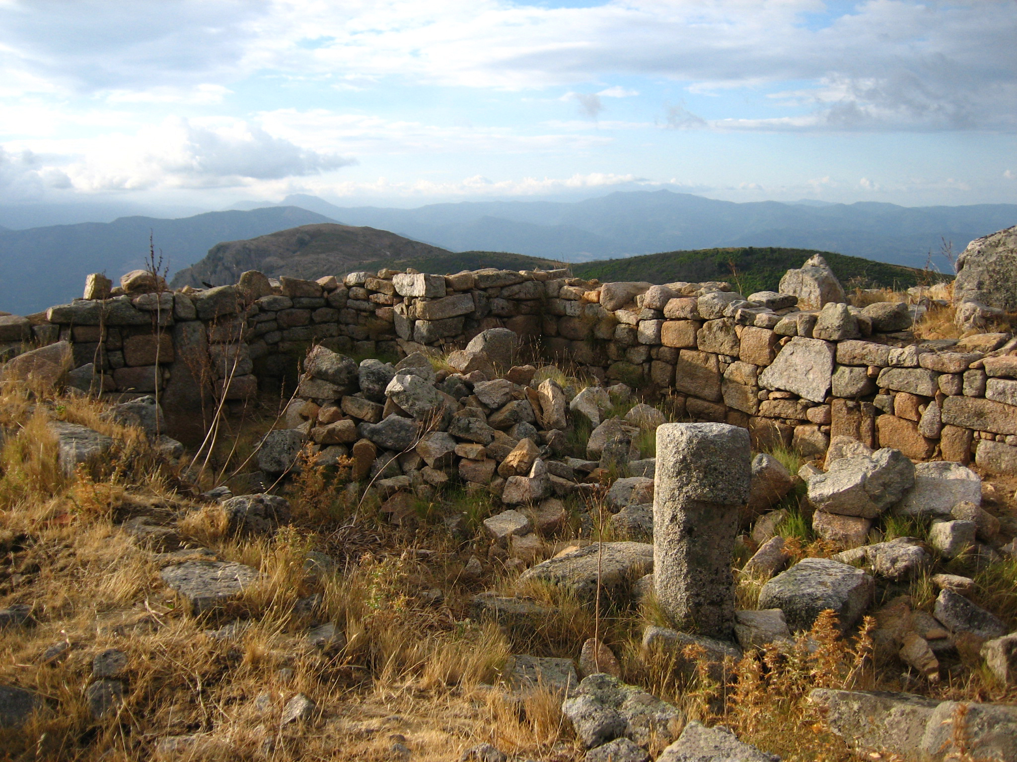 Chapelle san Sisto d'Appietto